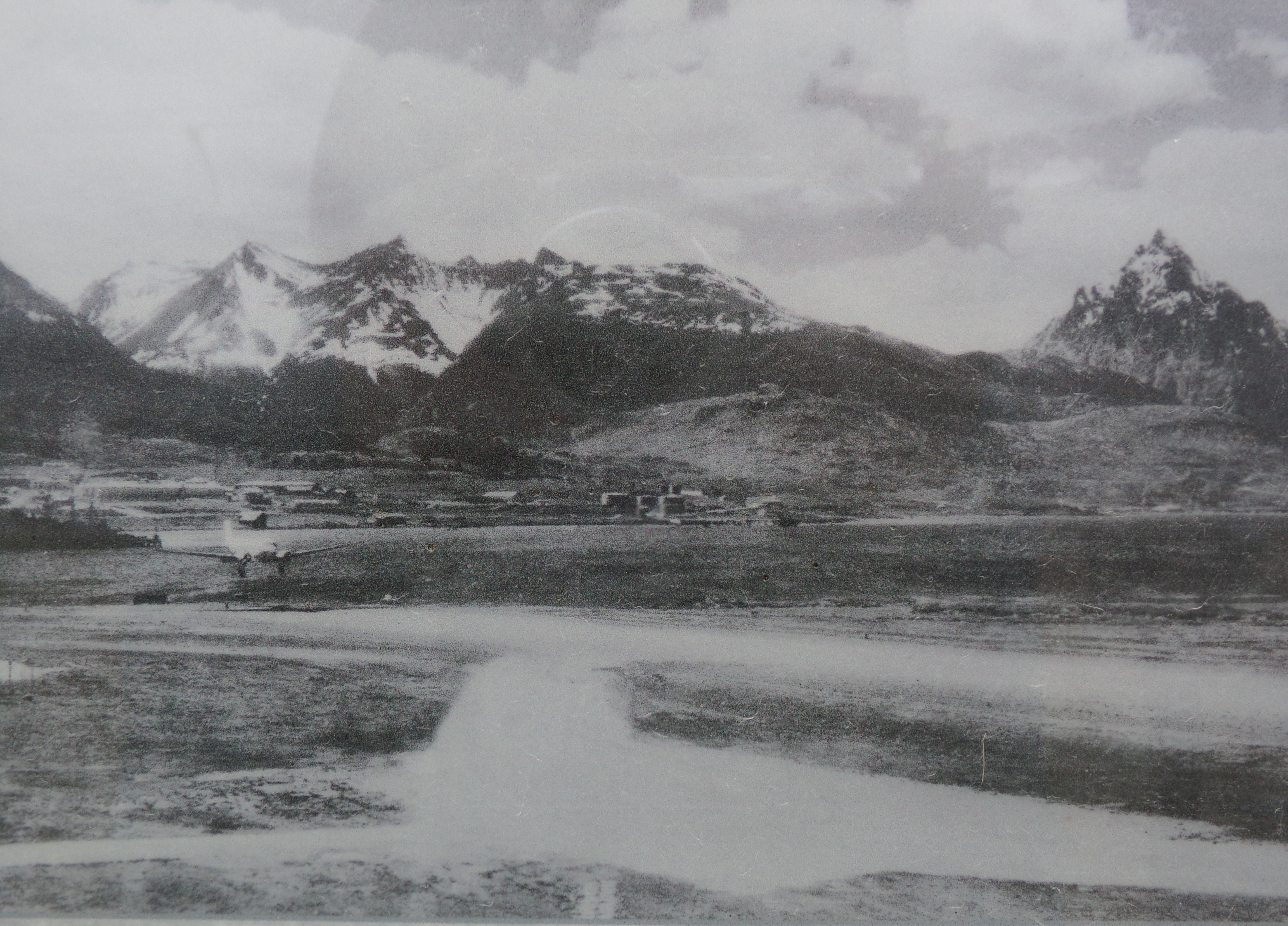 DC3 de Aeroposta Argentina en el Aeropuerto viejo, actual aeroclub